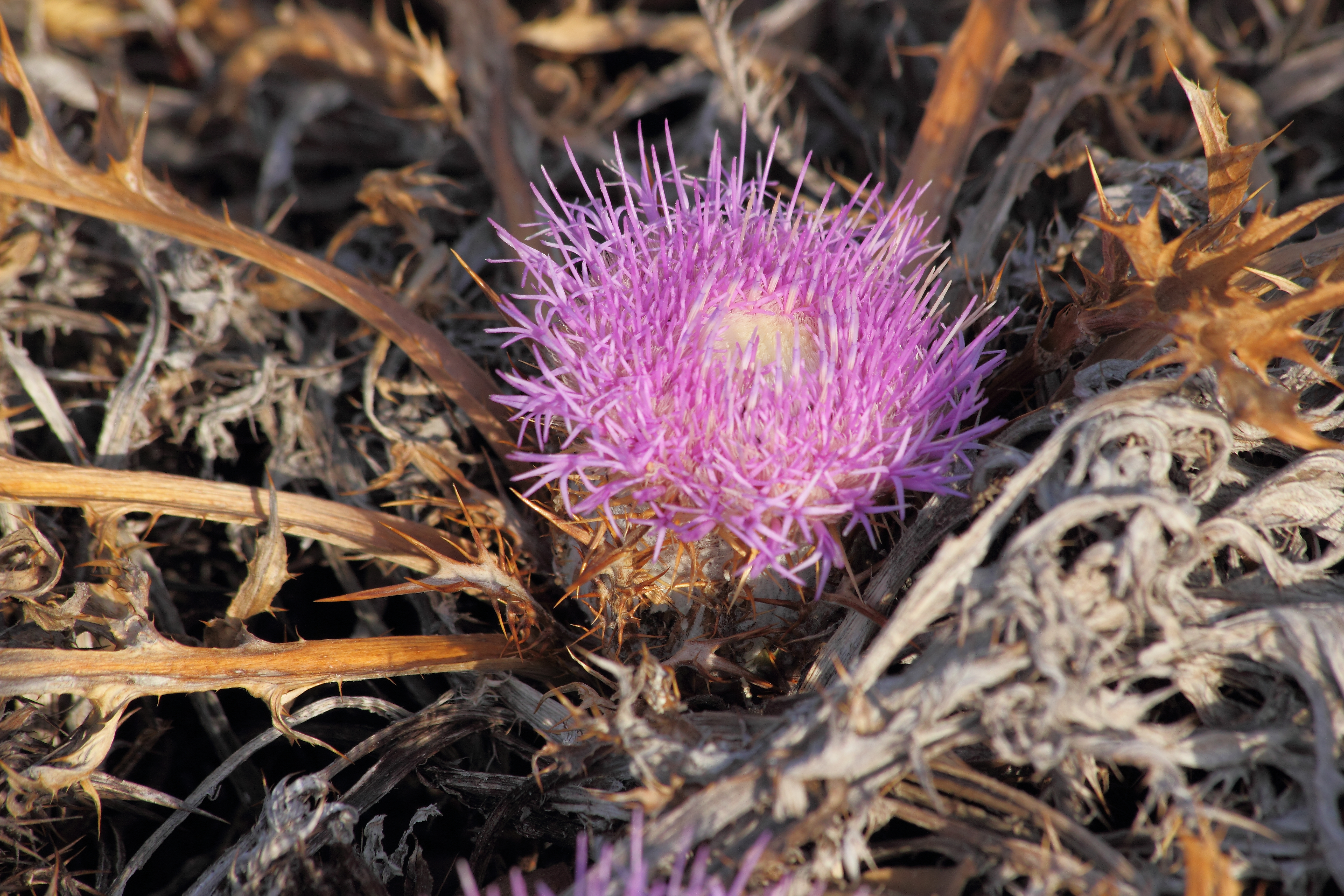 Encontra-se em clareiras de matos, prados e pastagens em solos calcários, sempre em zonas soalheiras e quentes.